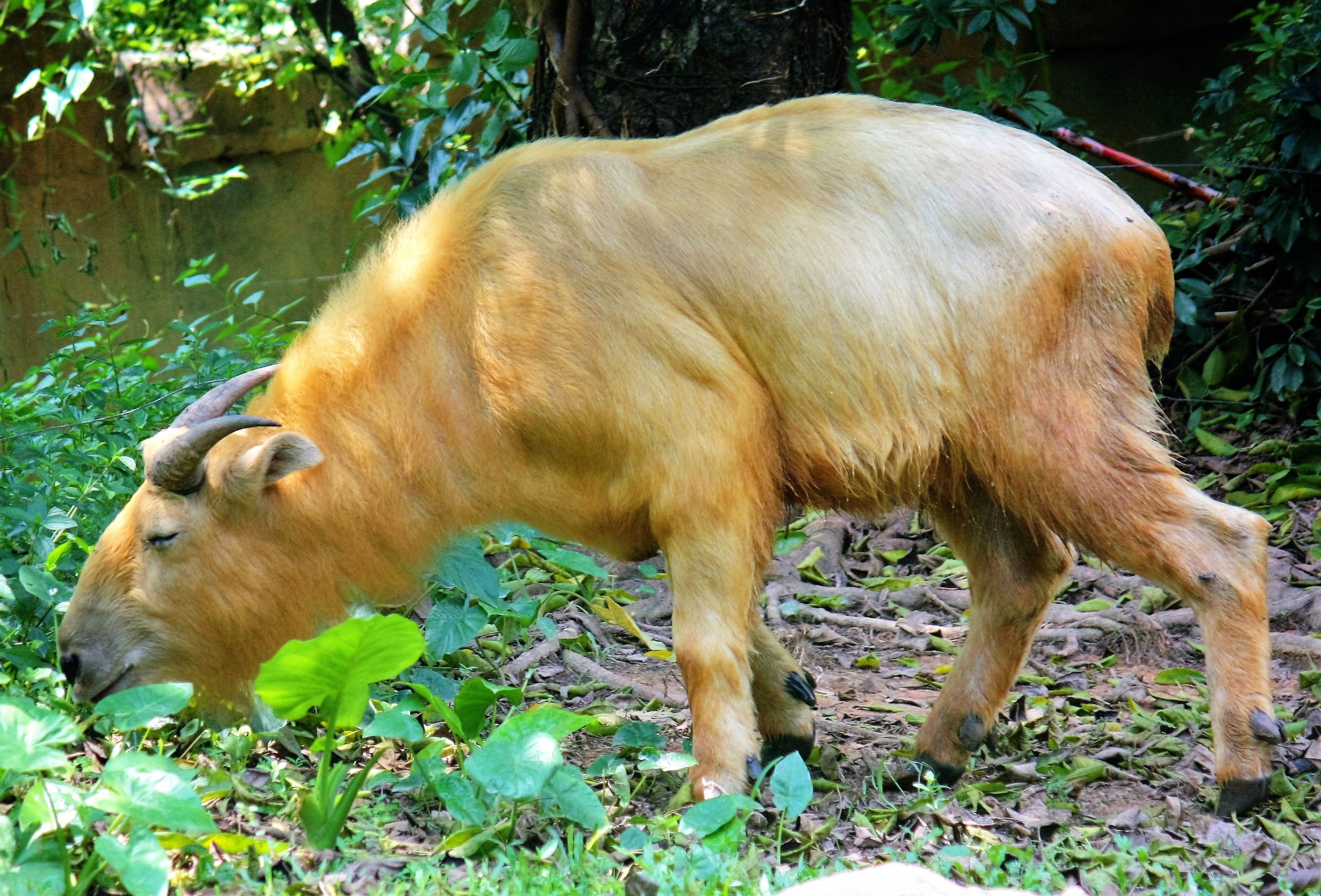 Zoo Guangzhou